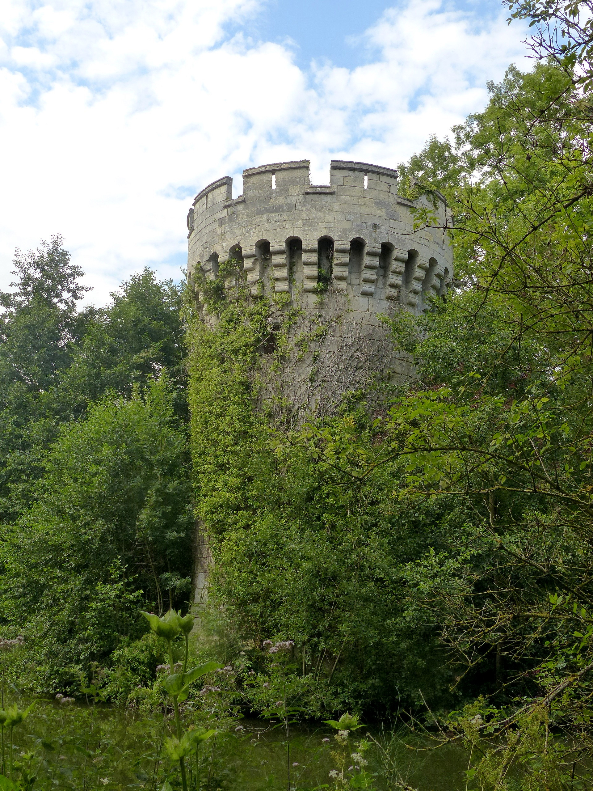 La Tour de Vaurseine